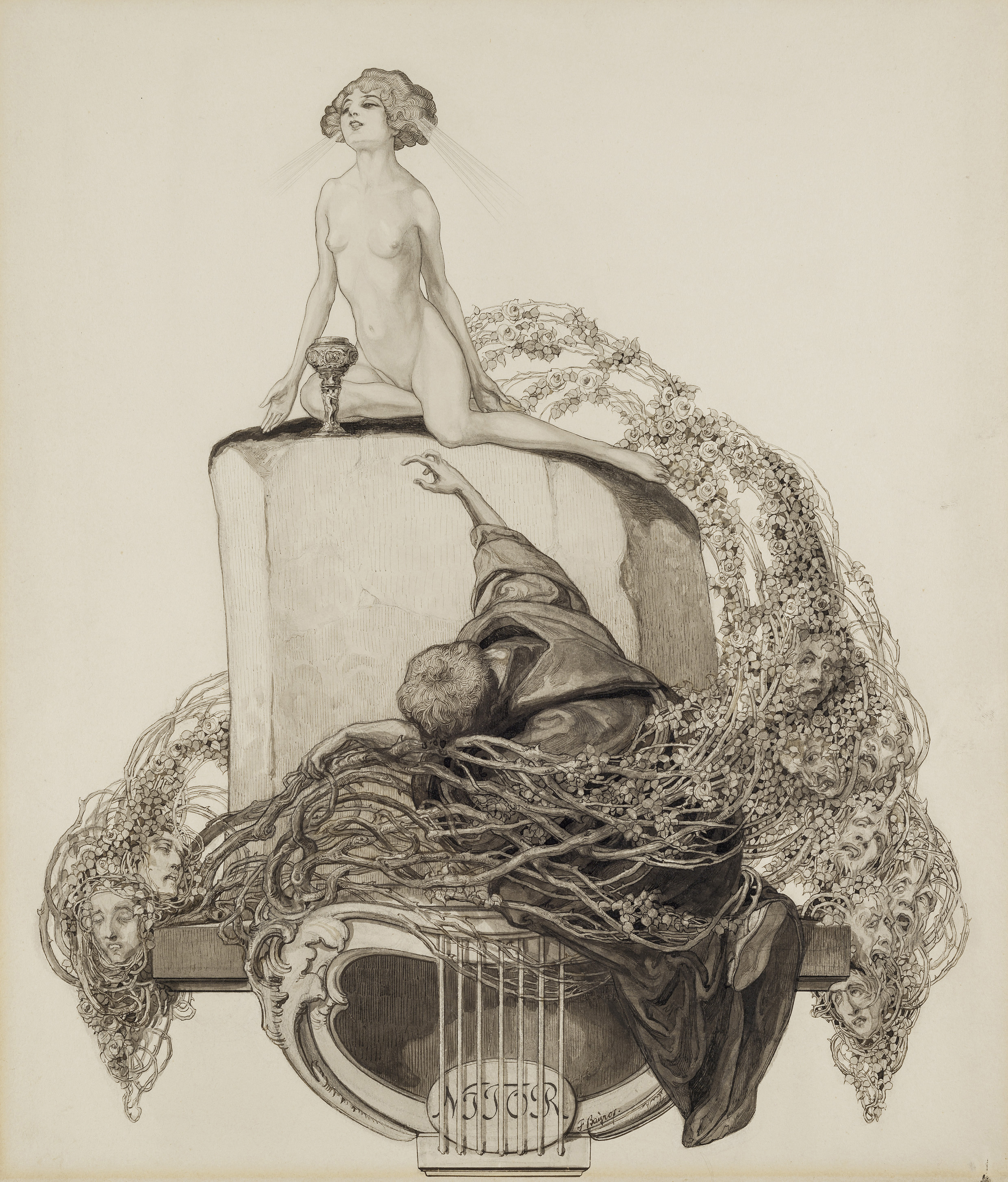 Franz von Bayros: Ex Libris Walther und Amelia Fahrenhorst, Tusche, Feder und Pinsel über Bleistift auf Karton, 47 x 41 cm, Rechts unten signiert